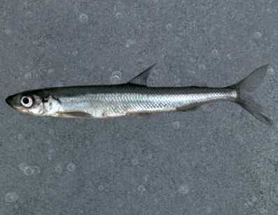 Pez teleósteo, es pariente del salmón, es de unos veinte centímetros de largo aproximadamente, su dorso es verdoso y de vientre blancusco, con una banda plateada en los flancos y la mandíbula ligeramente prominente. Es propio de los mares del norte de Europa y frecuenta las desembocaduras de los ríos, donde freza. Su nombre proviene de la palabra francés éperlan y esta de la palabra alemán spierling. Existen dos tipos de eperlanos: -El de Europa que mide entre 15 a 25 cm. de longitud -El eperlano viridescens, que abunda en los ríos en las cercanías de Boston y en los lagos de América. Este pez se ingiere entero, se come todo, cabeza, espinas, cola y gonadas.